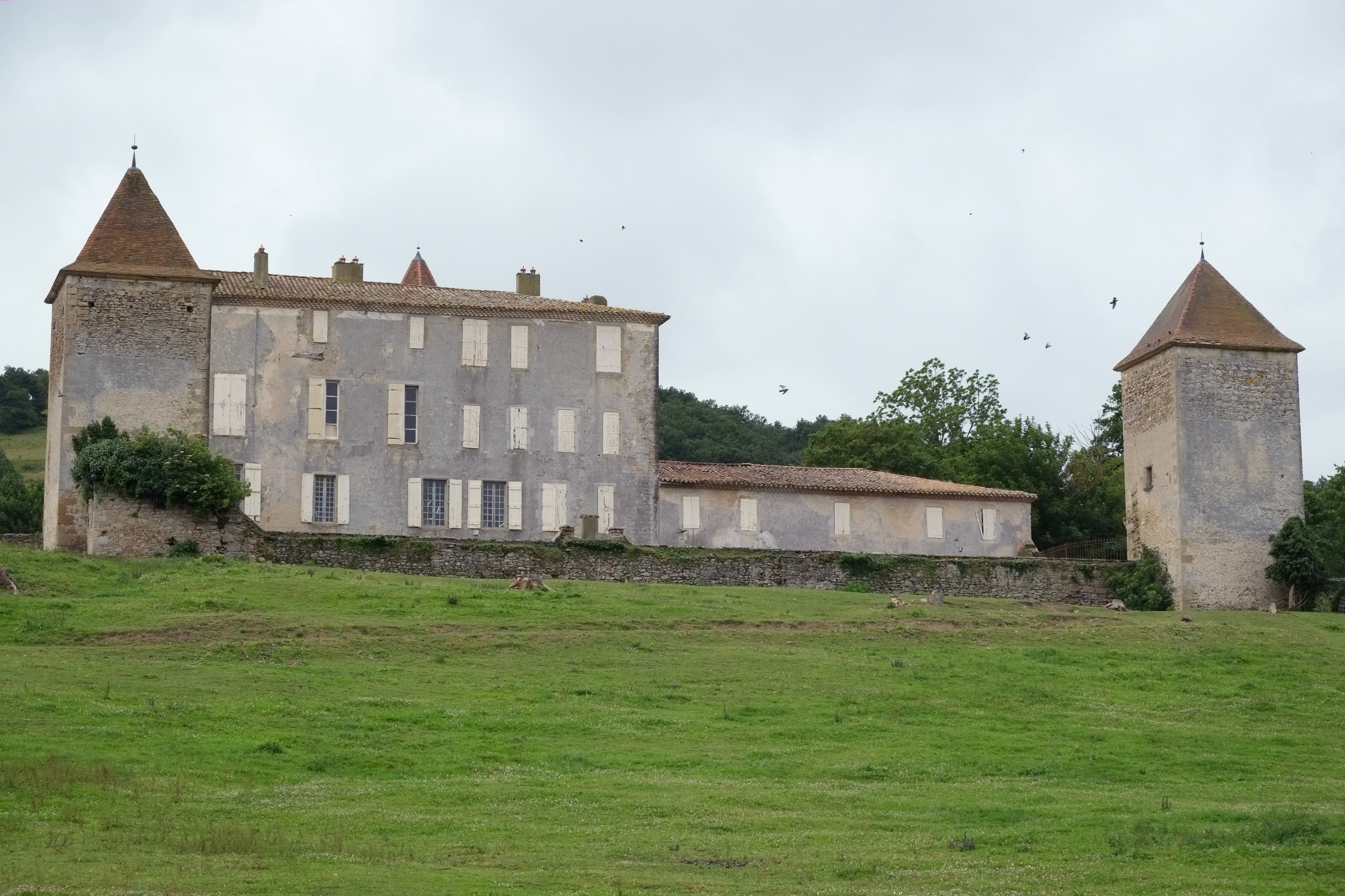 Schloss in Caudeval (Frankreich)